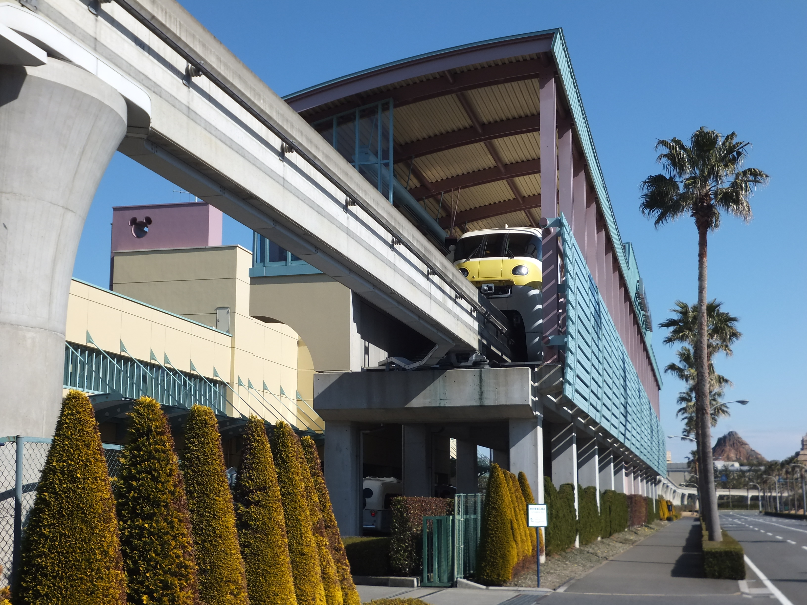 ディズニーリゾートラインベイサイド・ステーション駅